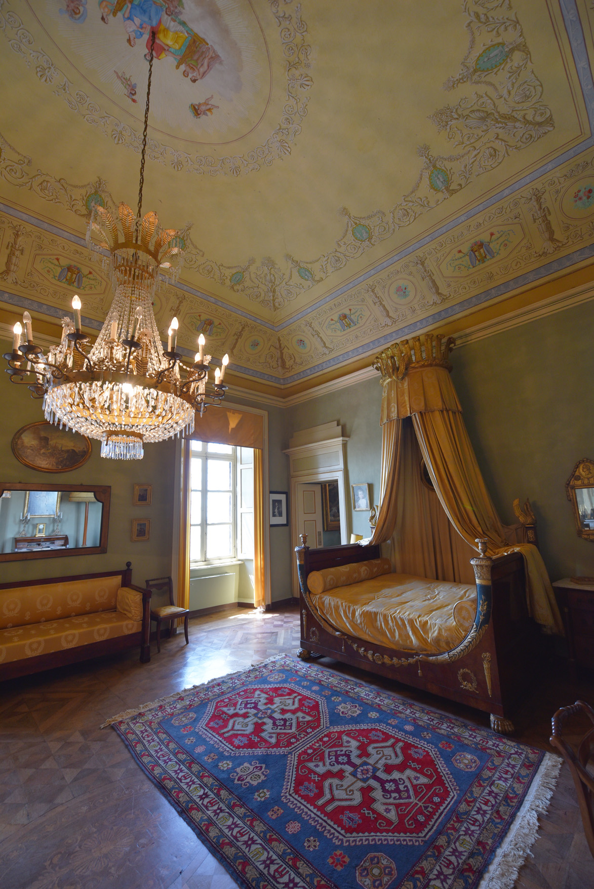 camera di Napoleone